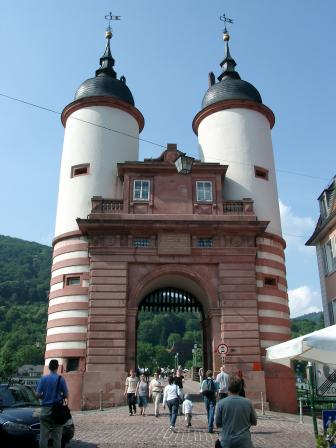 Heidelberg - gate to the Old Bridge Description in de wikipedia Foto des Hotels zum Ritter in Heidelberg. Aufgenommen am 15.06.2003. (C) Copyright 2003 Christian Bienia. Das Foto darf unter den Bedingungen der GNU Free Document License verwendet werden